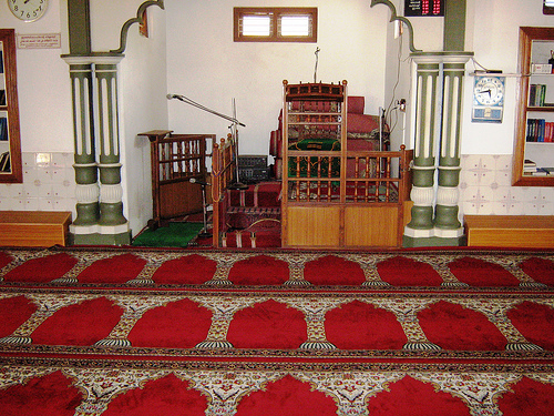 Syed Nagar Mosque, Alakode Road, Taliparamba, India.